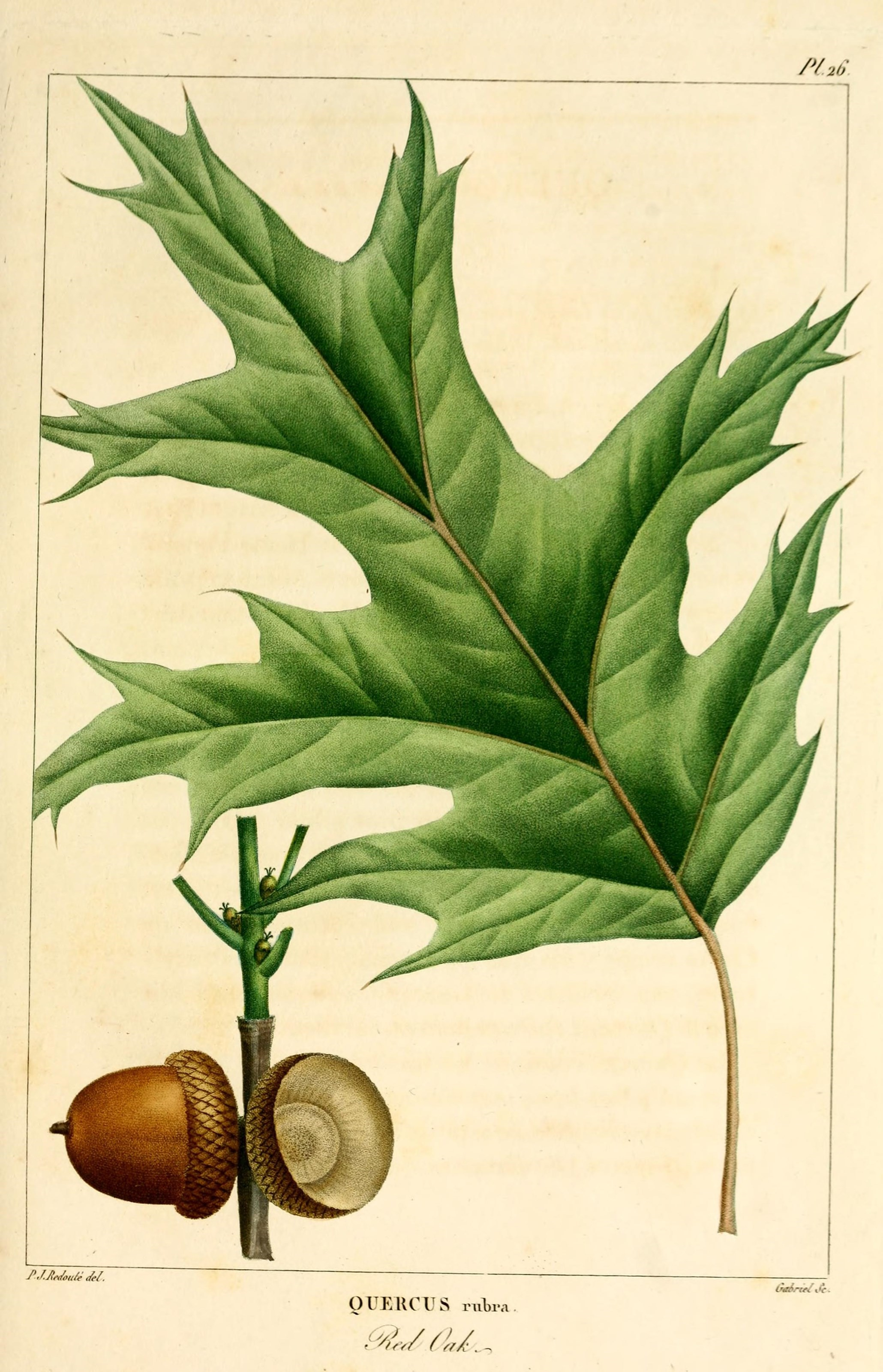 P/2Û. J.J.Mo„/é.i-l. QUEUCUS iMiWa (ne^rtr/i^ .